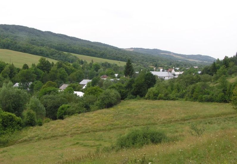 Celkový pohľad